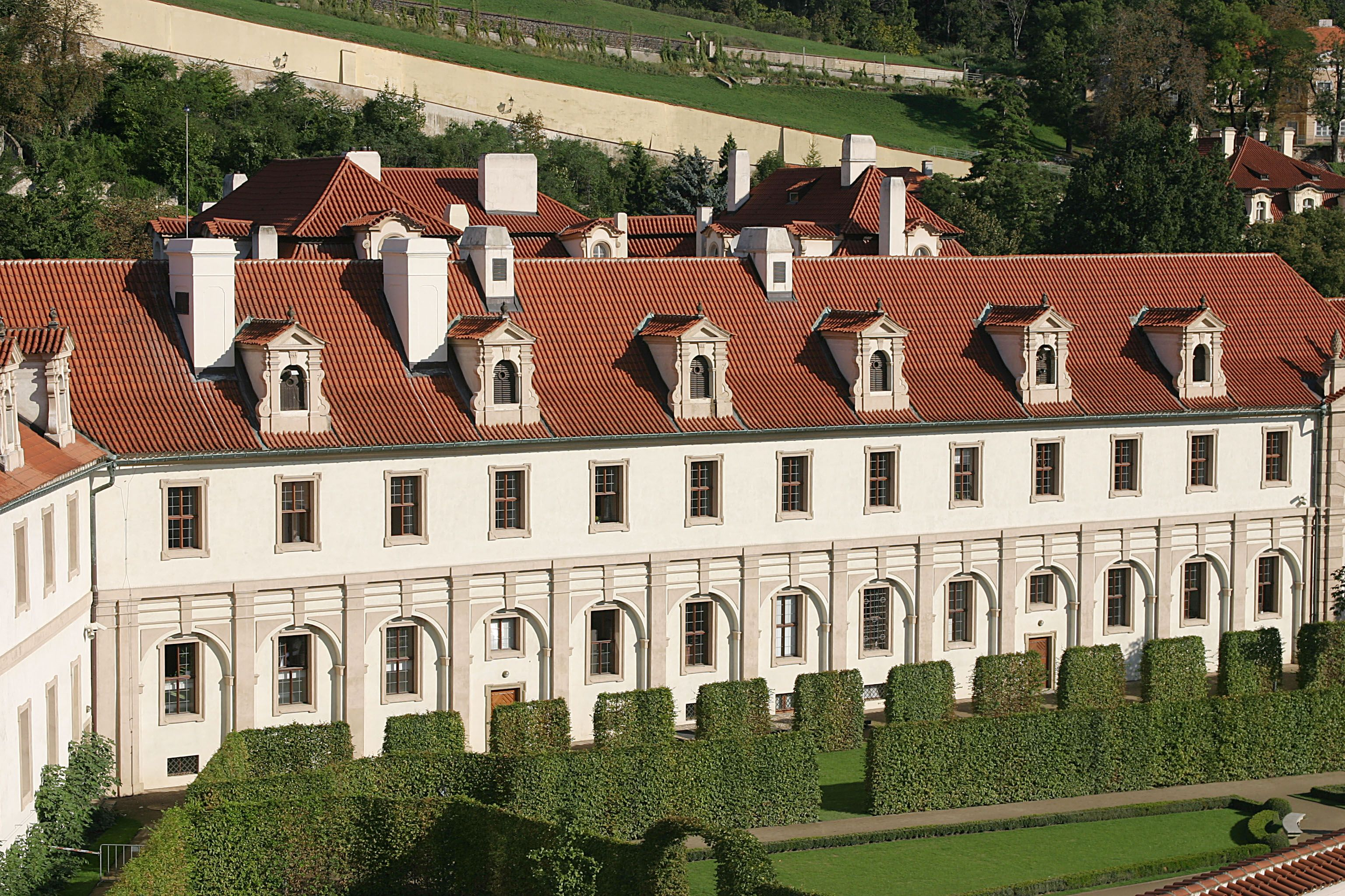 Valdštejnský palác, Lobkowicz wing